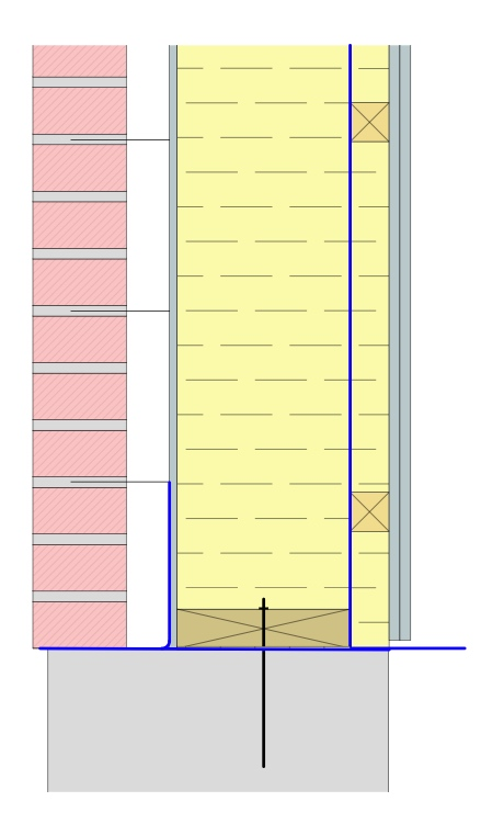 Opbygning af en let ydervæg med tegl som udvendig beklædning. Bærende konstruktion af træ.